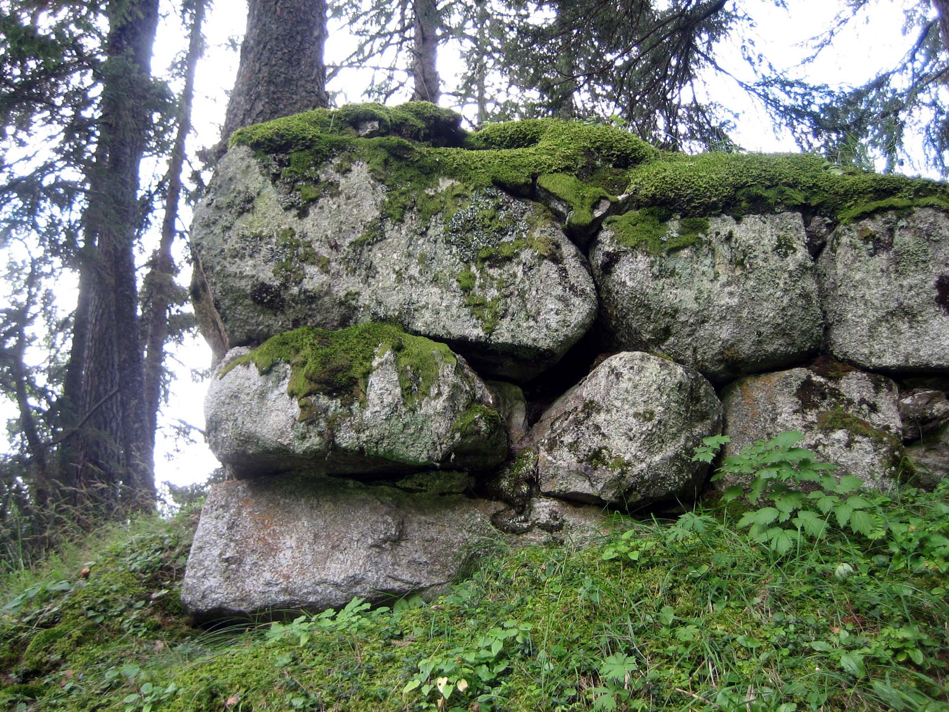 Turmecke